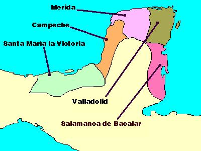 Provincias de Yucatán en 1549, después de la conquista de los Montejo